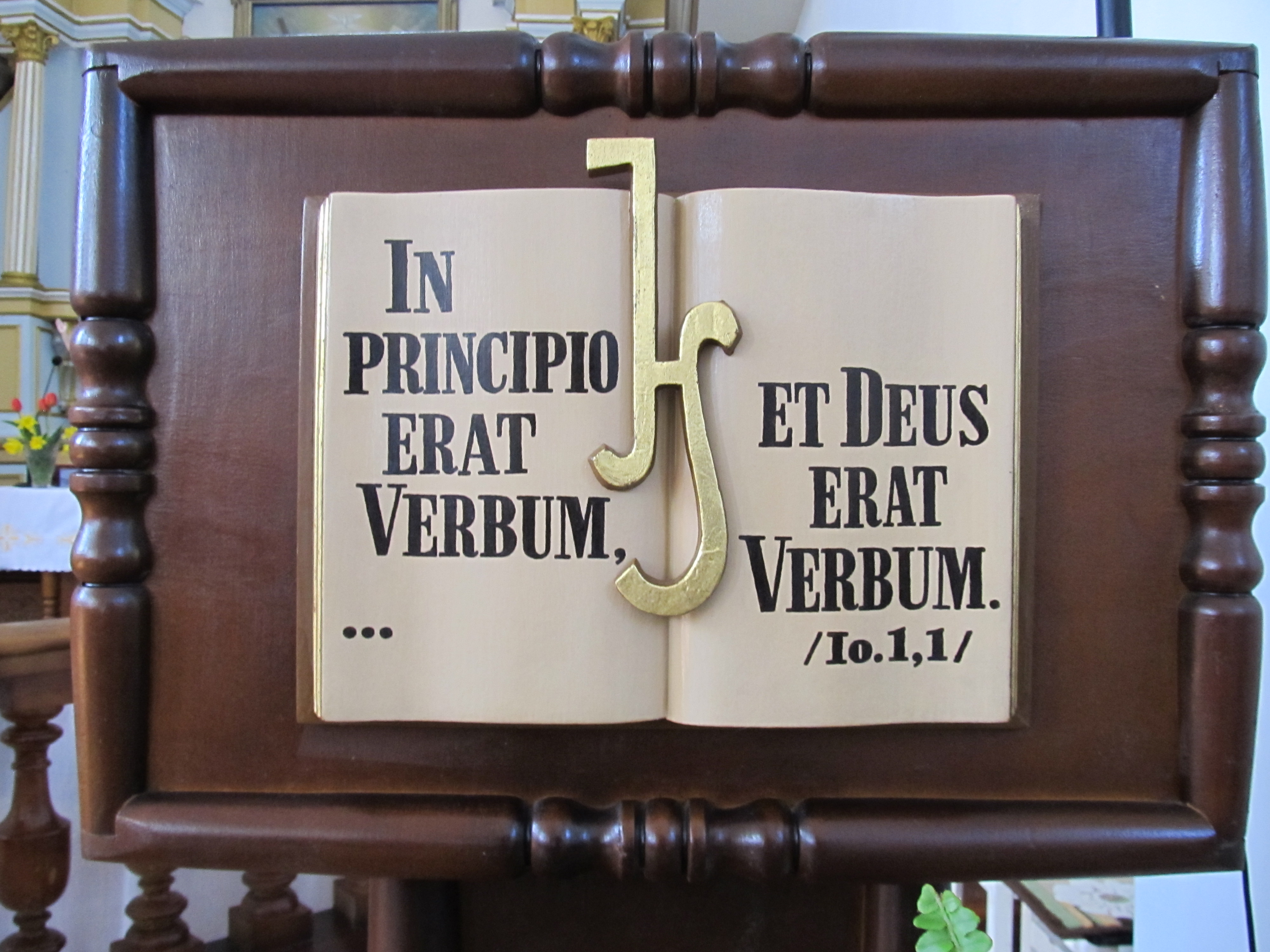 Беларуская (тарашкевіца): Касьцёл Найсьвяцейшай Тройцы (Шарашоў) This is a photo of Belarusian heritage monument. Reference number: 113Г000657 ( WLM)